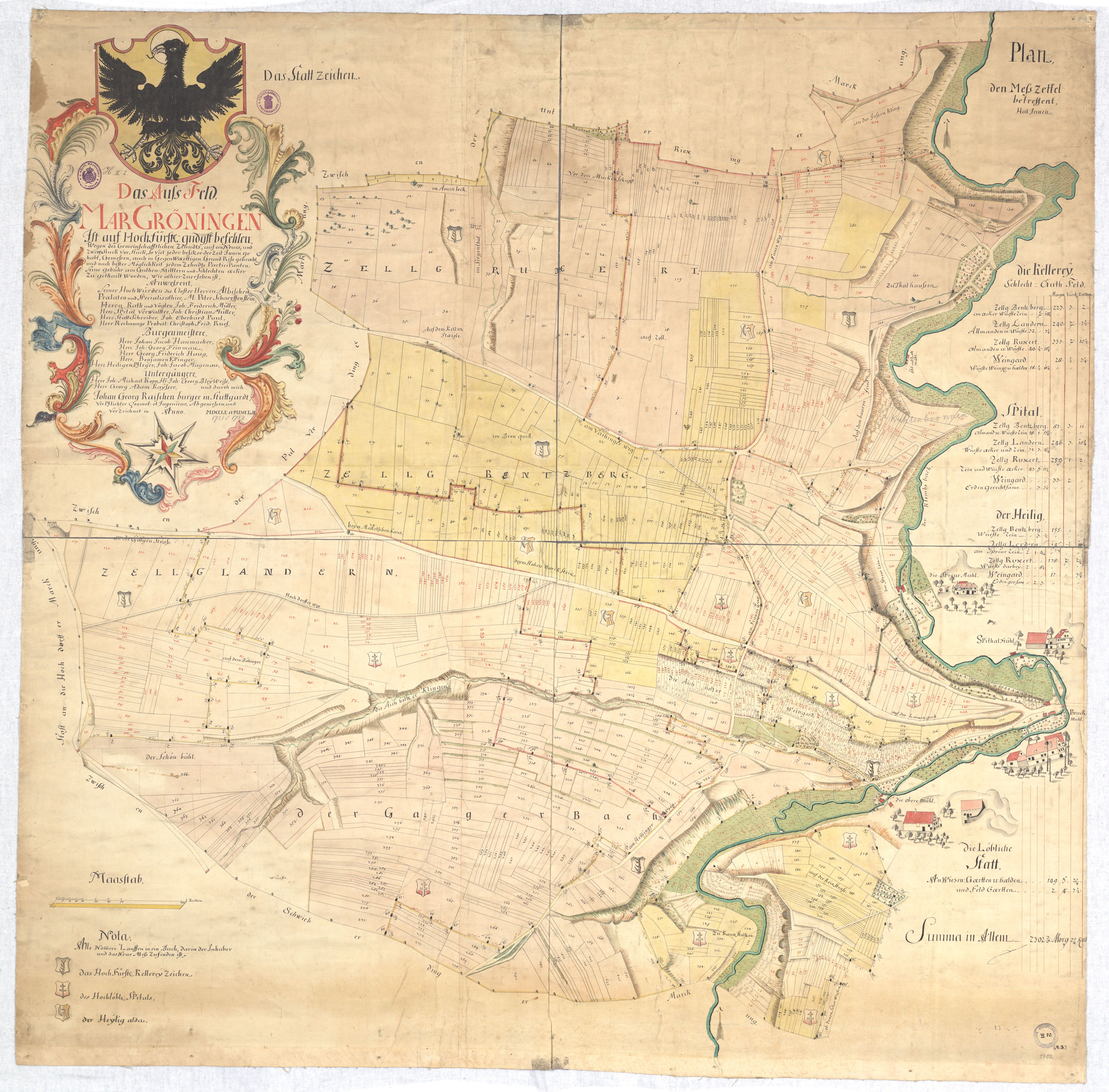 Situation des größtenteils links der Glems gelegenen Komplexes an Äckern und Weinbergen mit nummerierten Parzellen sowie Grenzen zwischen den einzelnen Zehntberechtigten / Angabe der Zehntberechtigten durch deren Wappen (Württemberg, Spital zu Markgröningen, Kirchenheiliger daselbst) / Lauf der Glems mit drei Mühlen (diese auch in bildhafter Wiedergabe) / Erklärung der Wappen, tabellarische Übersicht der Flächengehalte der Zehntbereiche, getrennt nach Zelgen bzw. Weinbaugebiet, mit Anteil wüster bzw. als Rain und Allmende geltender Flächen / Titel in Rokokorahmen, gekrönt von Reichsadler, enthaltend Namen der an Begehung des Geländes beteiligten Personen (herzogliche Beamte, Bürgermeister, Heiligenpfleger, Untergänger)